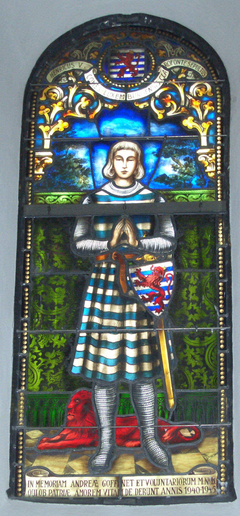 Fënster aus der Marienkapell vu Clairefontaine (Belsch).